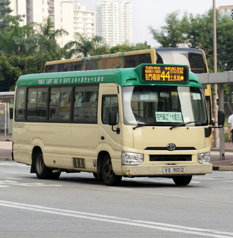 中文（香港）: 新界區專線小巴44線，正途經海珠路前往屯門碼頭